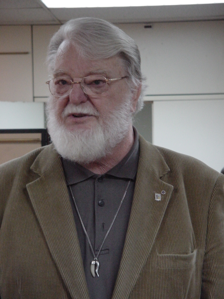 manfred1